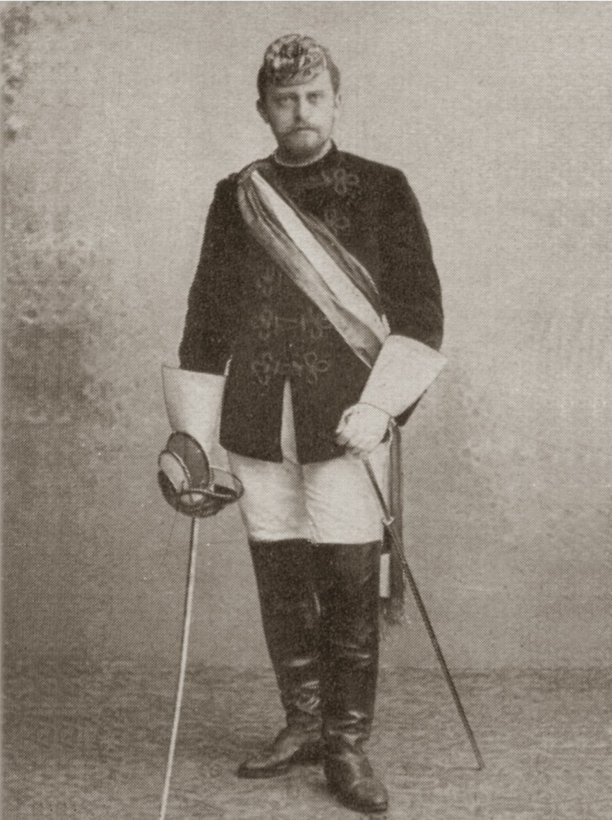 Karl Hans Strobl (1877-1946) als Student und Mitglied der Akadmischen Verbindung Austria (heute: Corps Austria) in Prag (heute: in Frankfurt am Main)